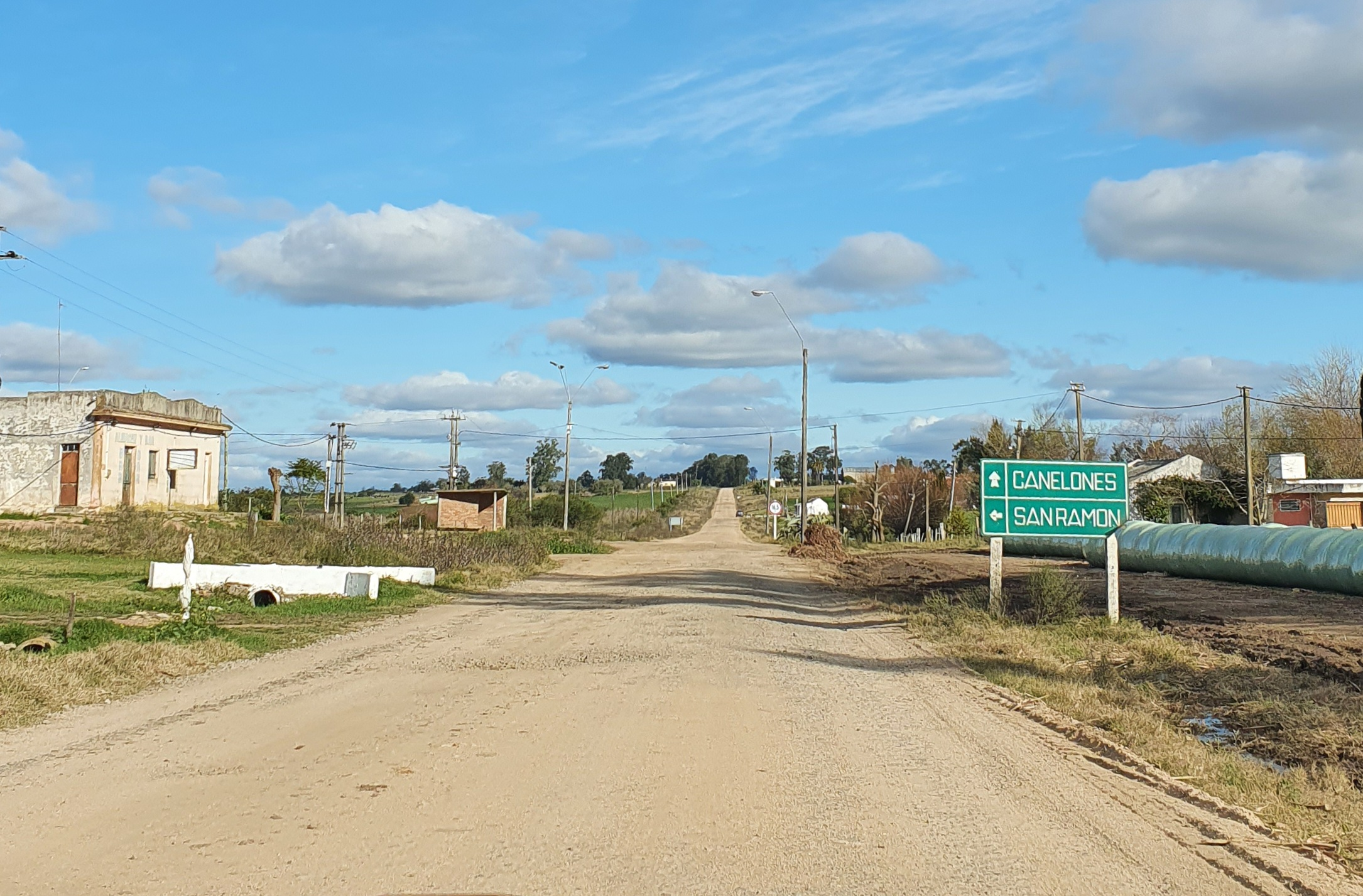 Ruta 63 en Paso Pache. Uruguay